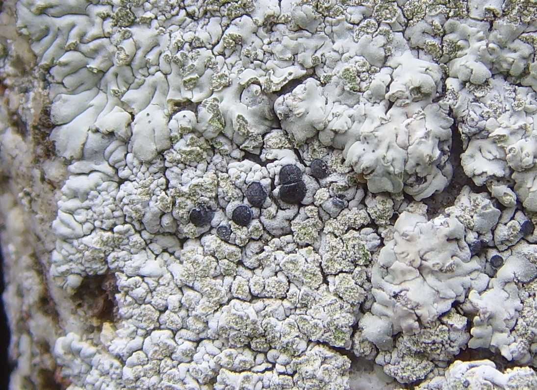 Diploicia canescens sur un mur, apothécies (Penn ar Run, Goulien, Finistère, Bretagne France)